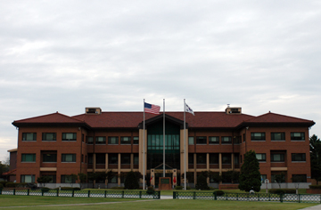 Huptquartier der 2. US-Infanteriedivision